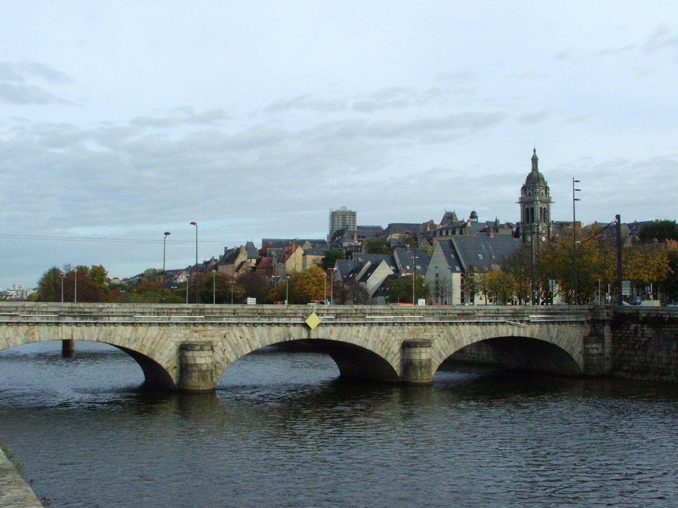 Le pont Gambetta et le micro-quartier Saint-Benoit au Mans, sur la rive gauche.